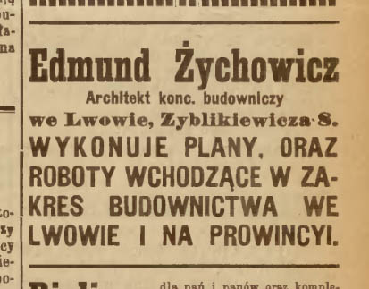 Реклама архітектора Едмунда Жиховича в газеті "Gazeta Lwowska" 1920, № 115.